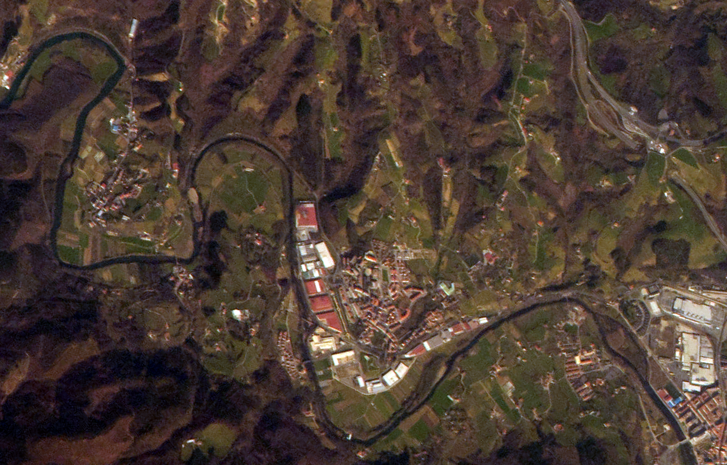 Usurbilgo irudia, Thomas Pesquet astronautak Nazioarteko Espazio Estaziotik egina. Argazkiaren kolore aldaketa eta mozketa nire lana da.